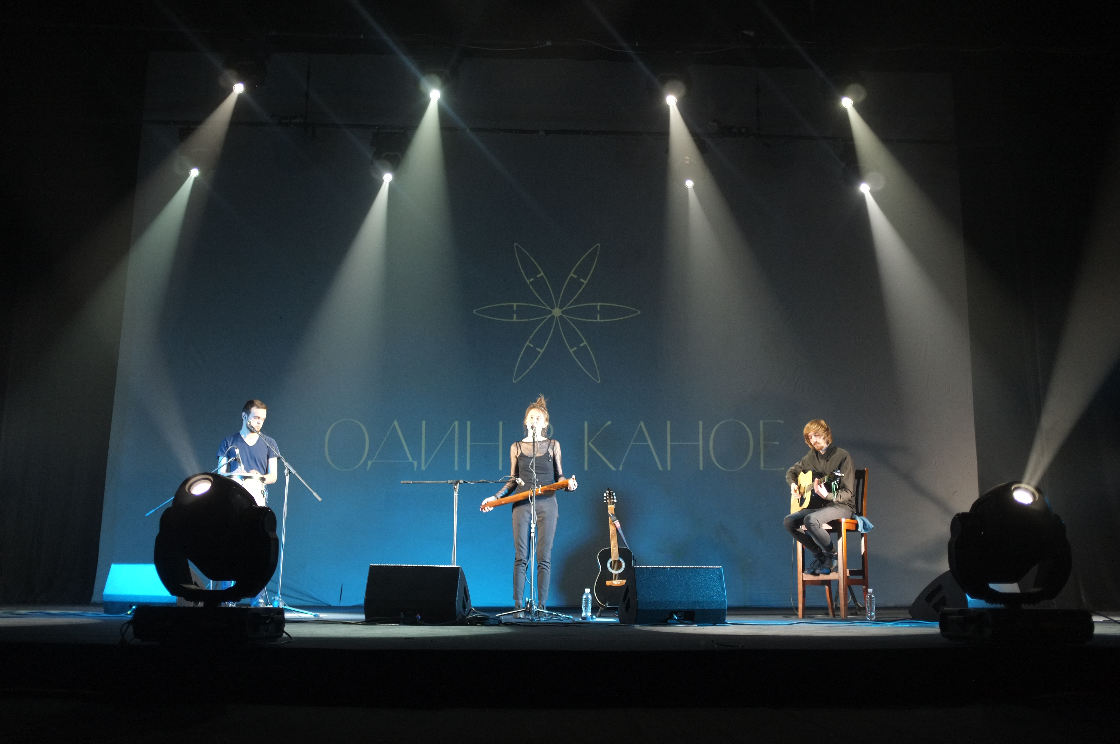 Додатковий концерт «Один в каное» у Львові, театр ім. М. Заньковецької, 4 квітня 2016 року.